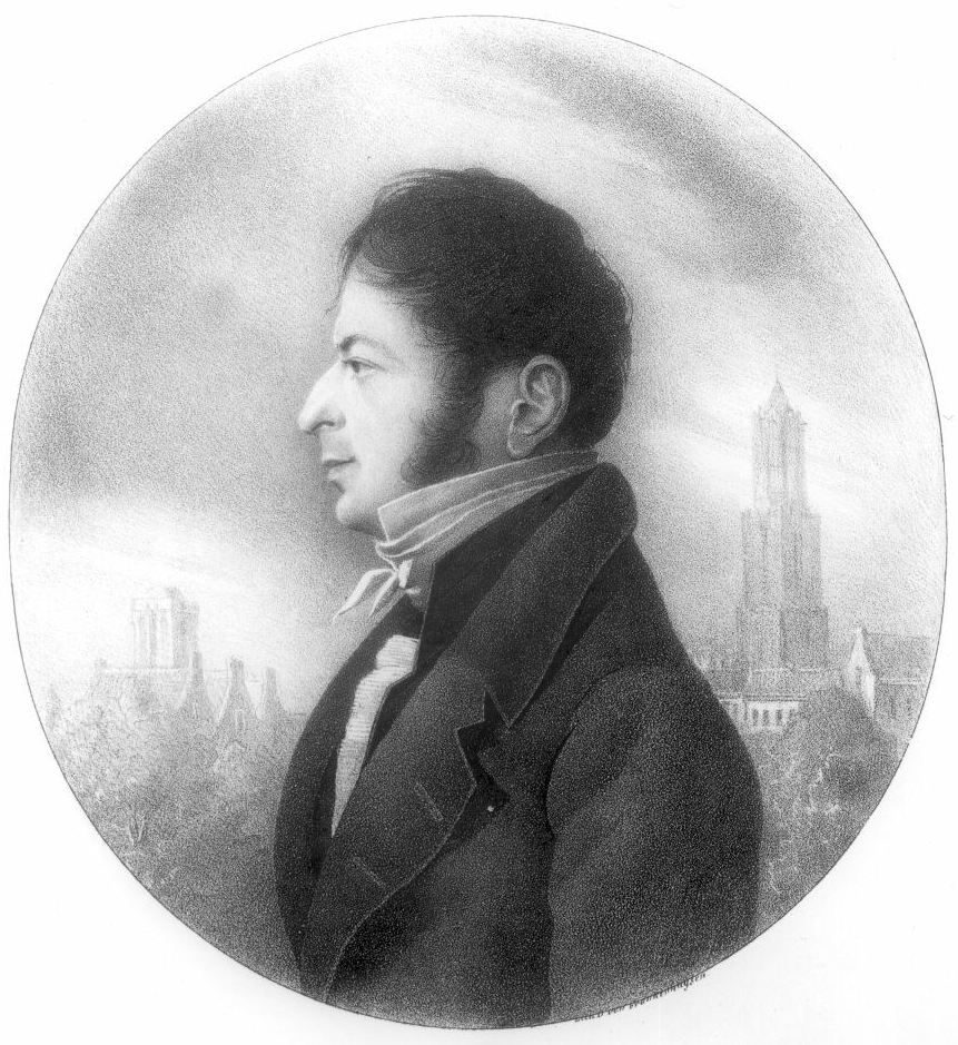 Portrait of Hubert Matthijs Adriaan Jan van Asch van Wijck.